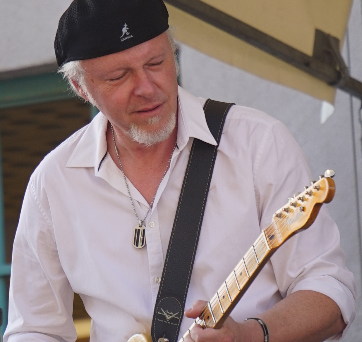 en concert à Reis.